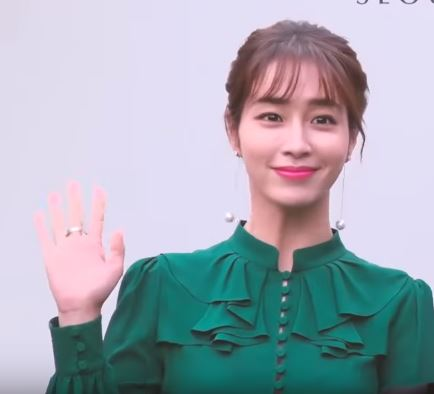 배우 이정현의 결혼기자회견이 7일 오후 서울시 중구 장충동 신라호텔에서 열렸다.